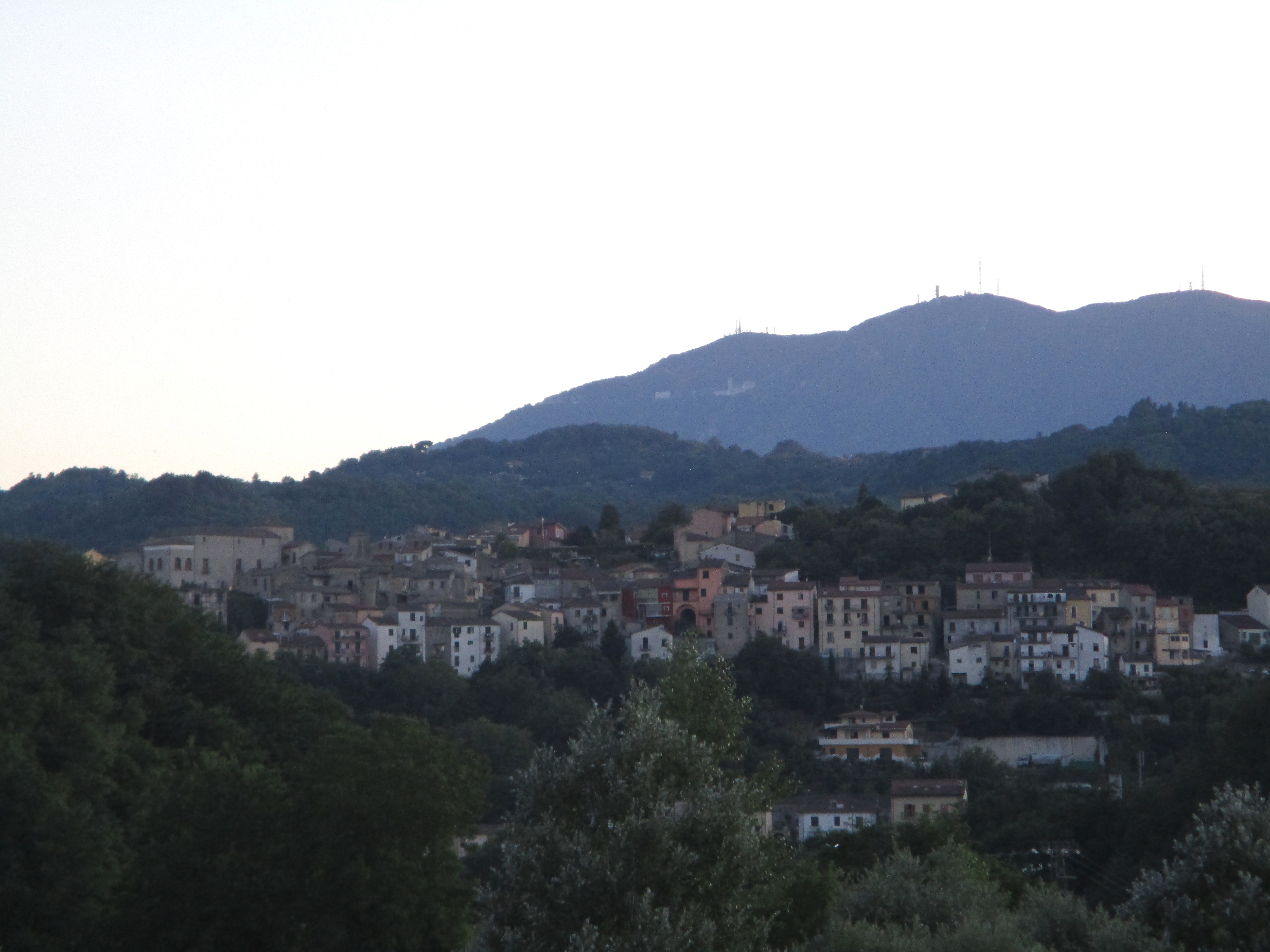 Vista del comune di Prata di Principato Ultra (AV) da Pratola Serra (AV)